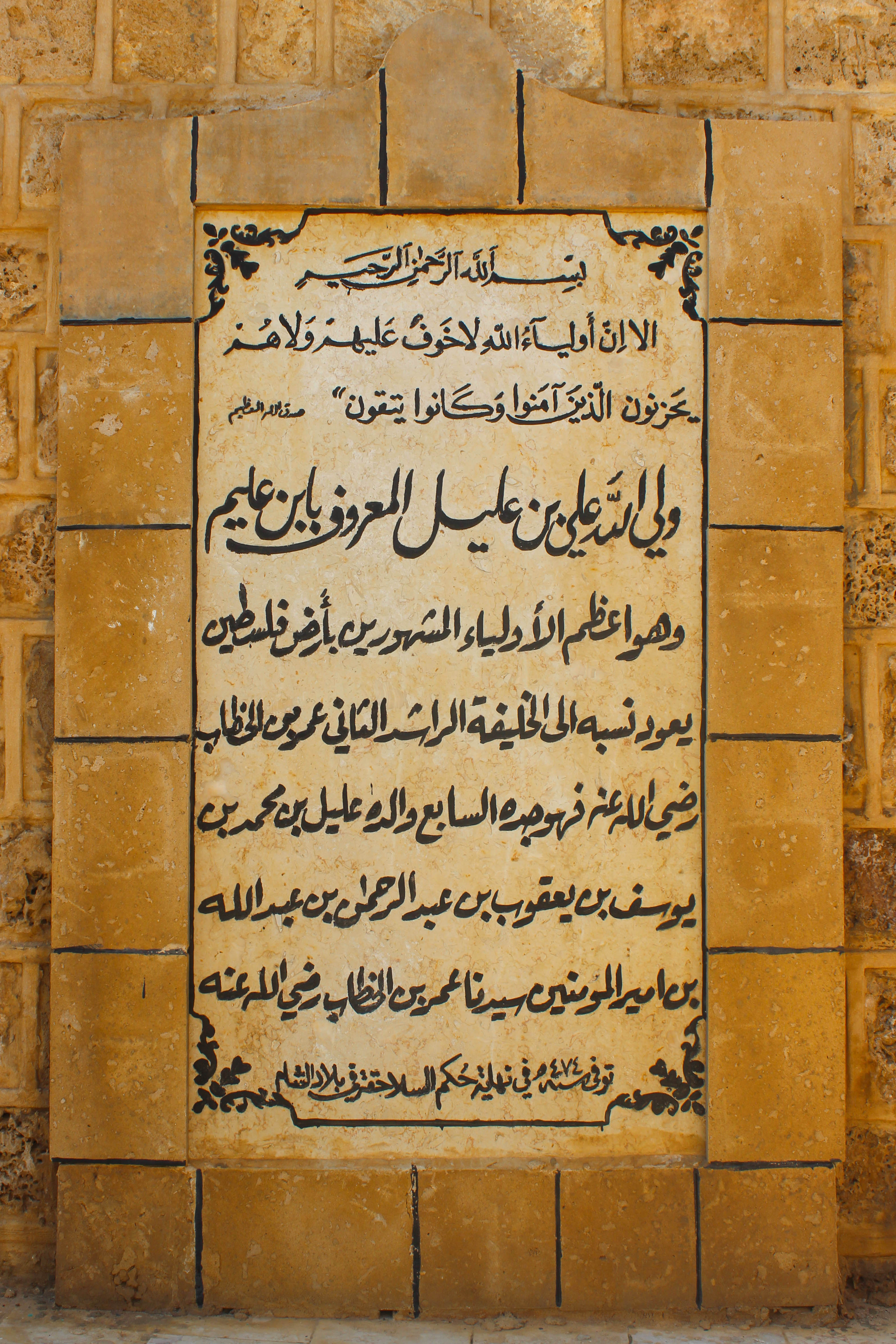 صورة من داخل ساحة المسجد وعلى أحد جدرانه كتبت لمحة عن ولي الله علي بن عليل المعروف بابن عليم.